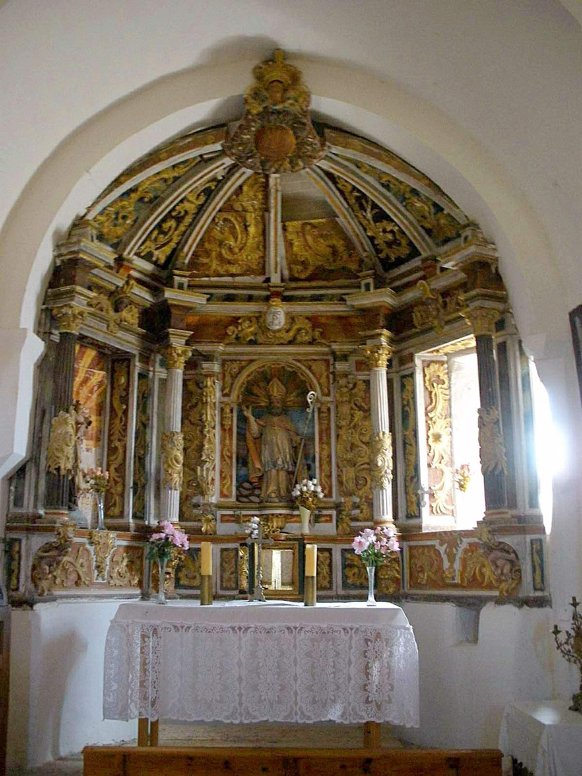 Iglesia de San Martín, en Prádanos del Tozo (Burgos)